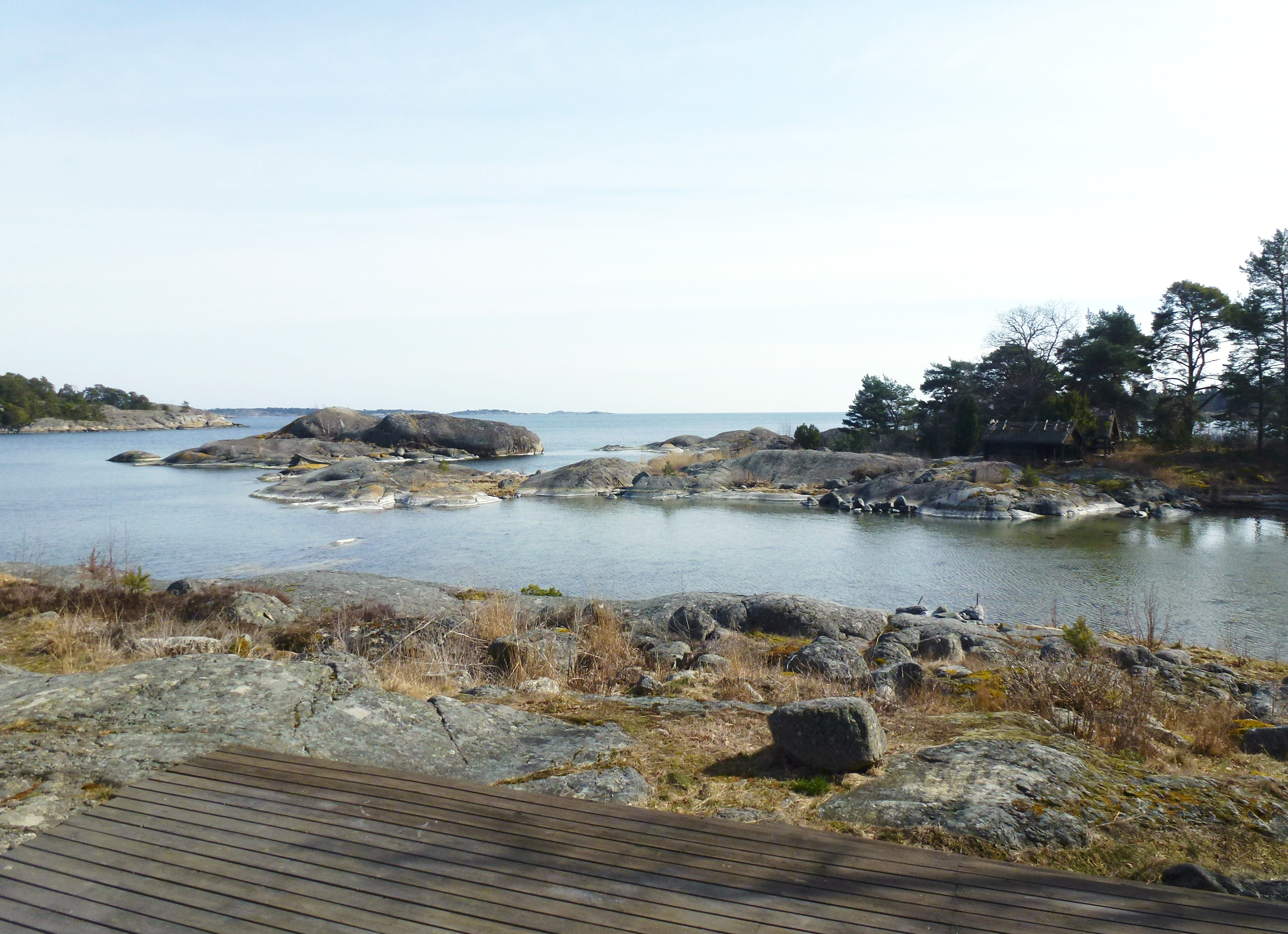 Villa Torsvis sjöbodar och kobbarna Storknasen och Lillknasen.